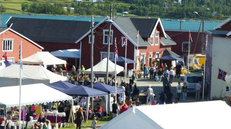 MARTNAOMRÅDE: Et oversiktsbilde som viser noe av martnaområdet i Gamle Gibostad.